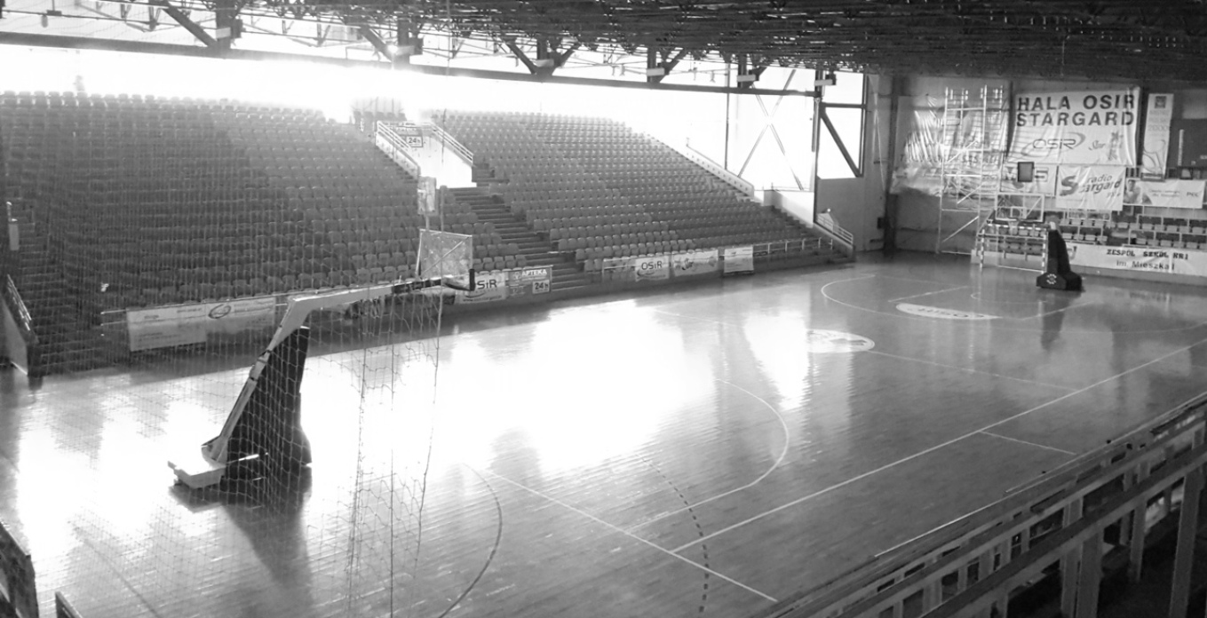 Stargard. Nowa dobudowana trybuna w 2000r. hali sportowej OSiR